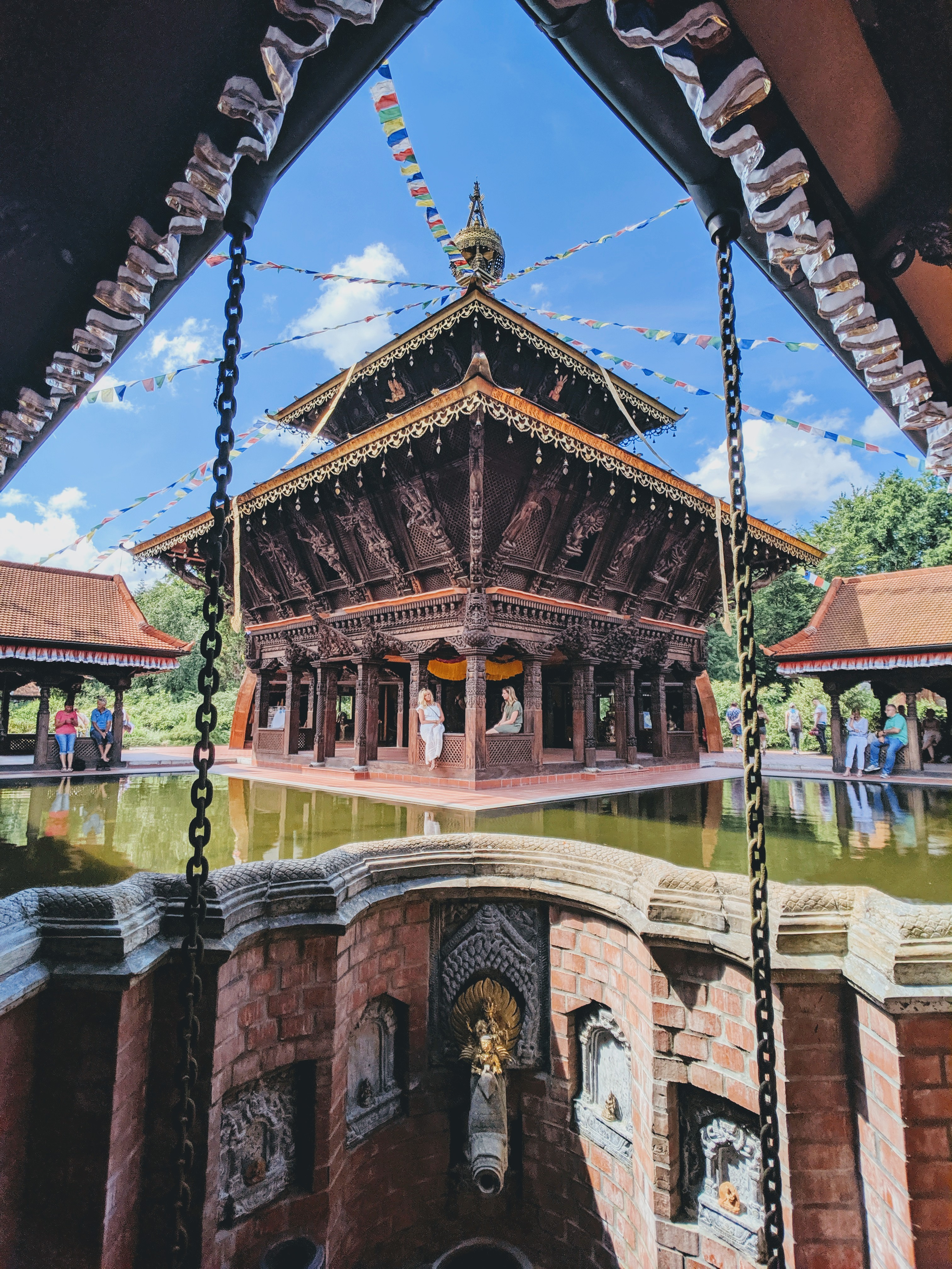 Innenhof des Tempels, welcher sich im Zentrum der Anlage befindet.